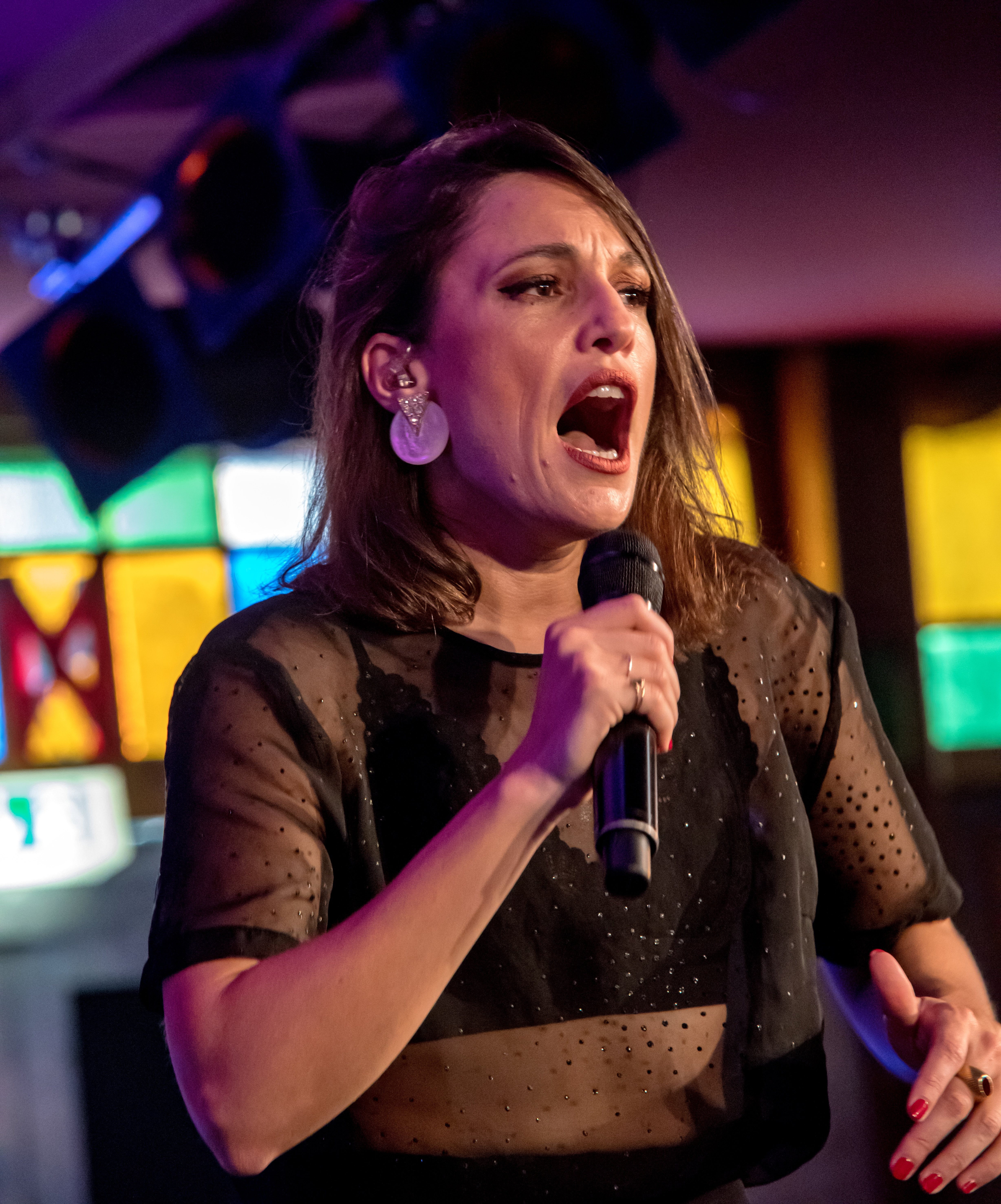 Bilder vom Zelt Musik Festival 2018 in Freiburg im Breisgau Auftritt Carminho am 24. Juli 2018 im Spiegelzelt